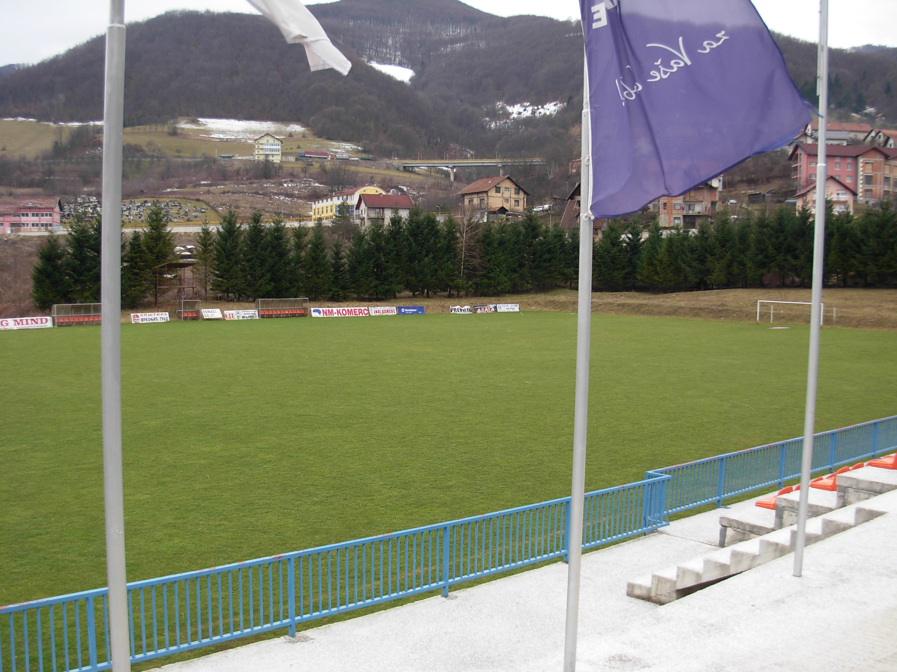 Stadion Luke, Mrkonjić Grad.